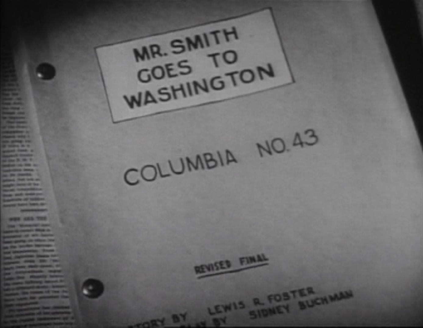 Script van Mr. Smith Goes to Washington